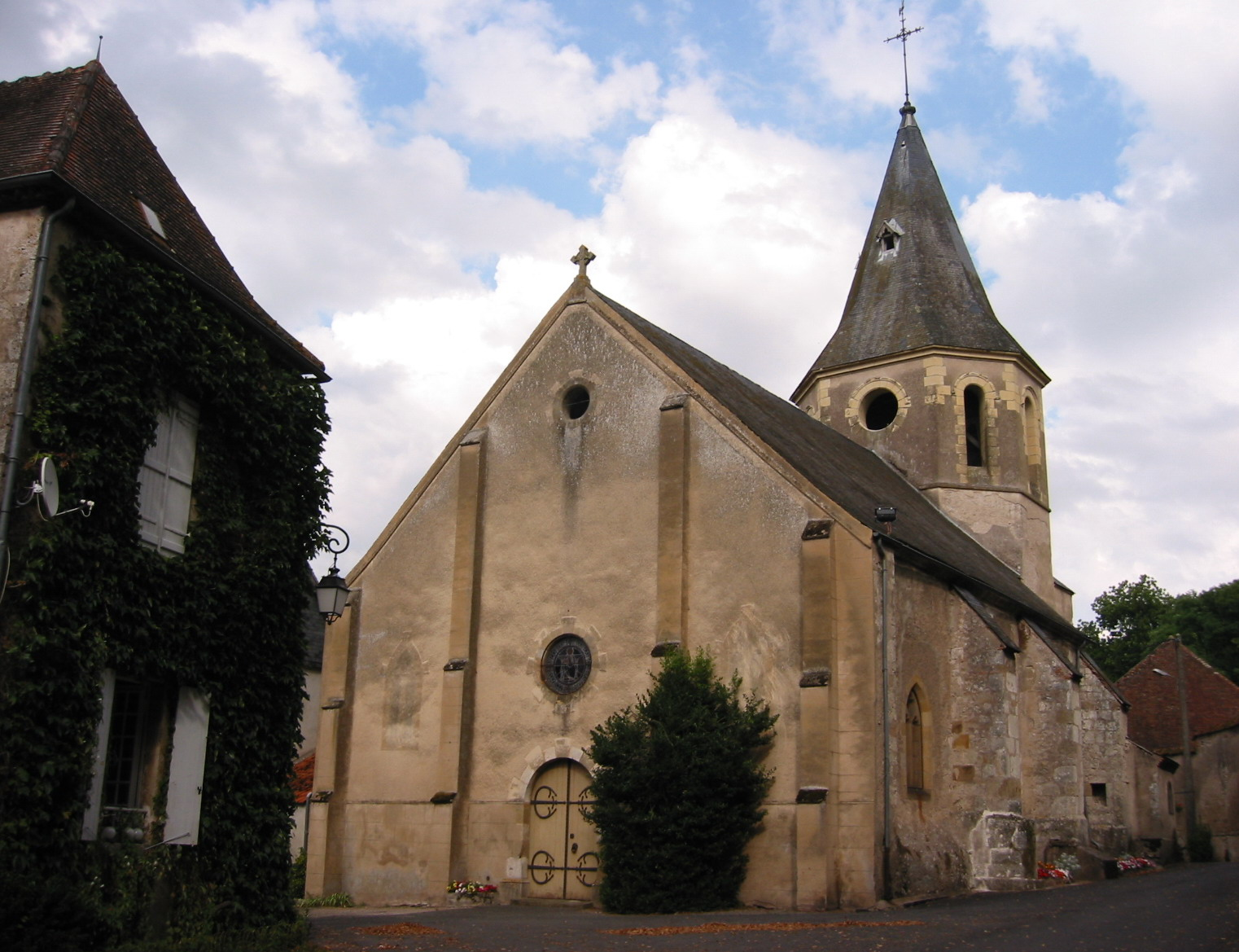 Jaligny-sur Besbre (France) - Église Saint-Hippolyte